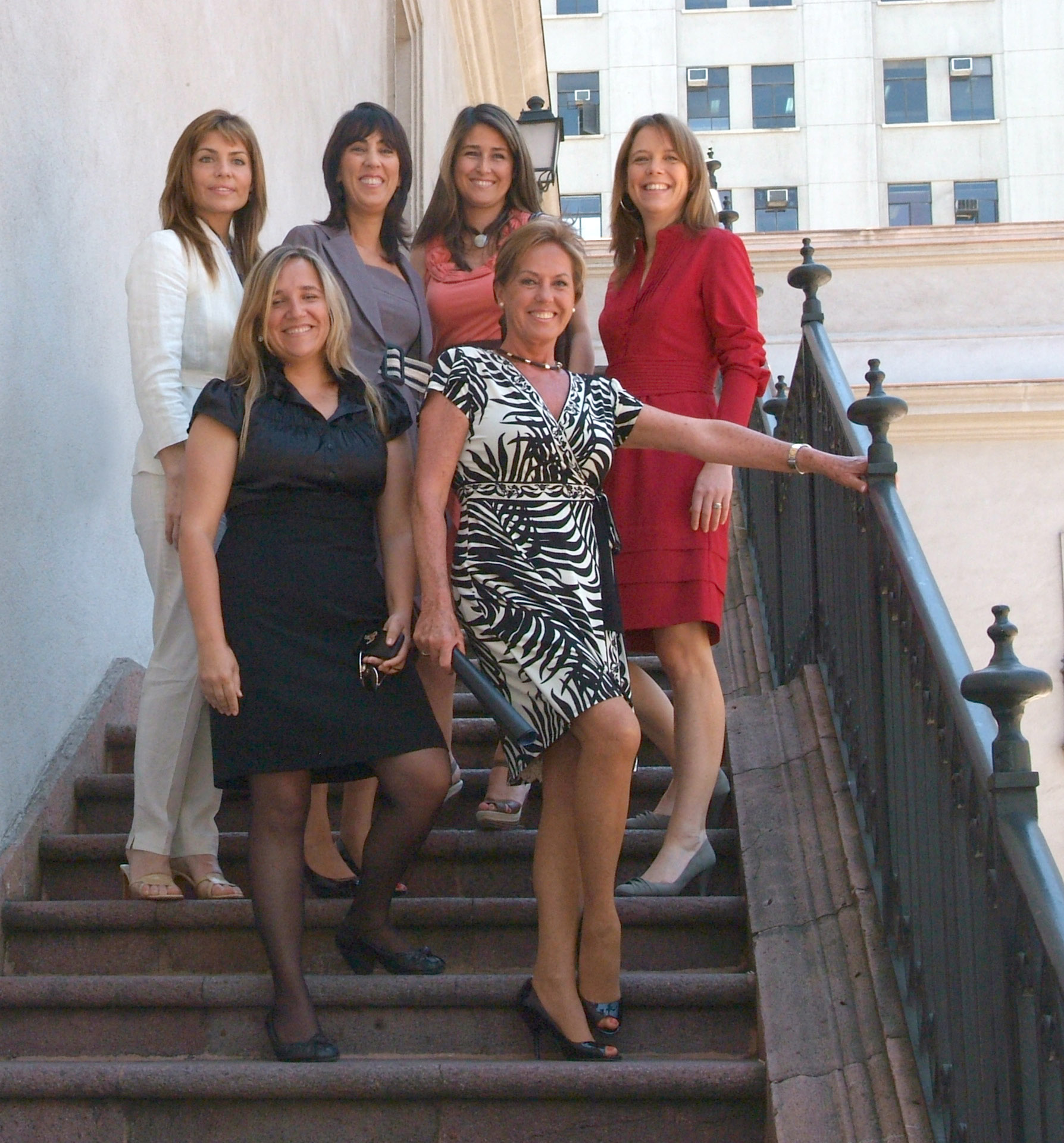 Ministra Secretaria General de Gobierno,Ena von Baer,juntas a parlamentarias de la Alianza.Palacio de la Moneda.